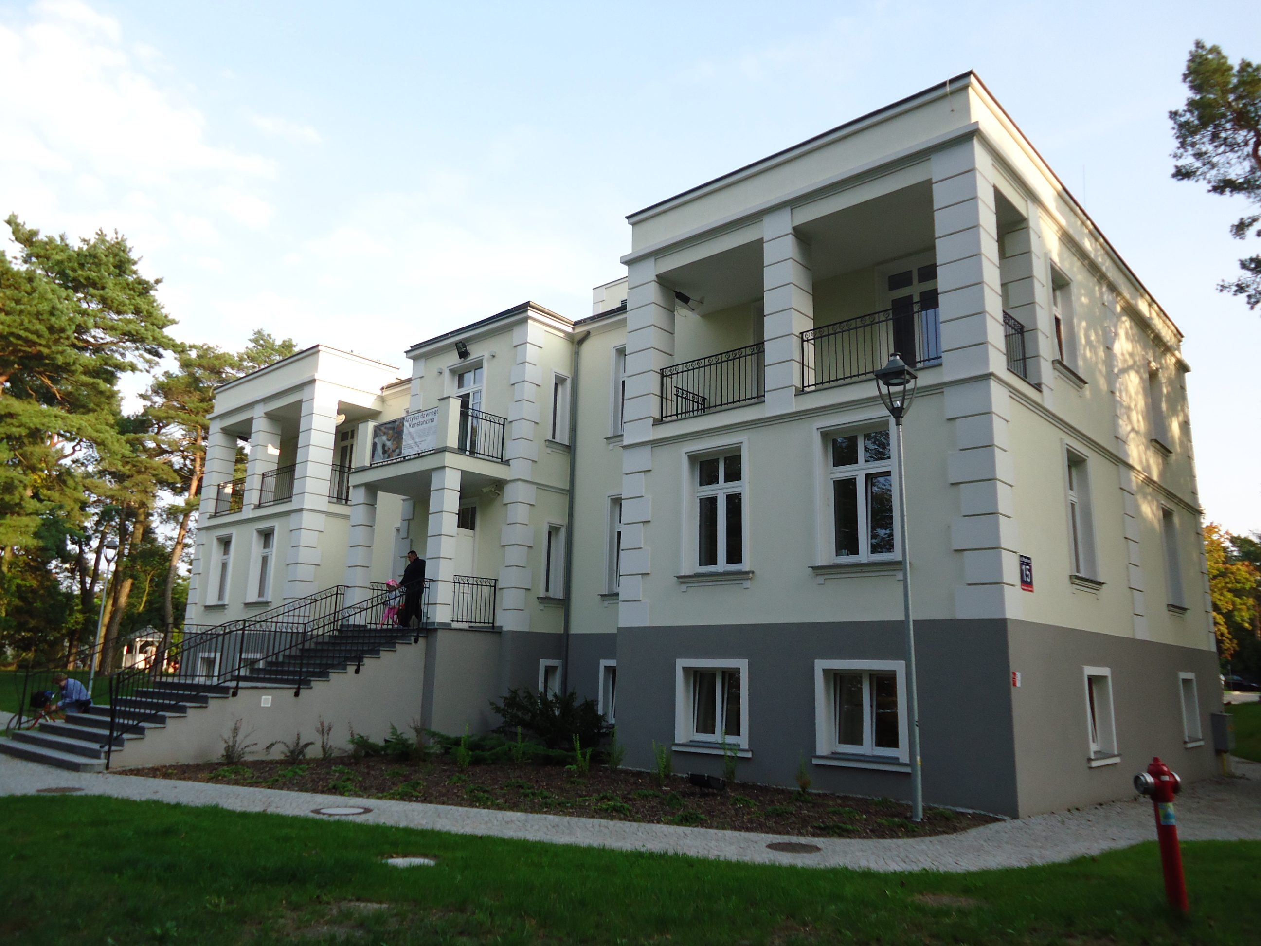 Konstancin-Jeziorna, pensjonat z zakładem przyrodoleczniczym HUGONÓWKA, 1902